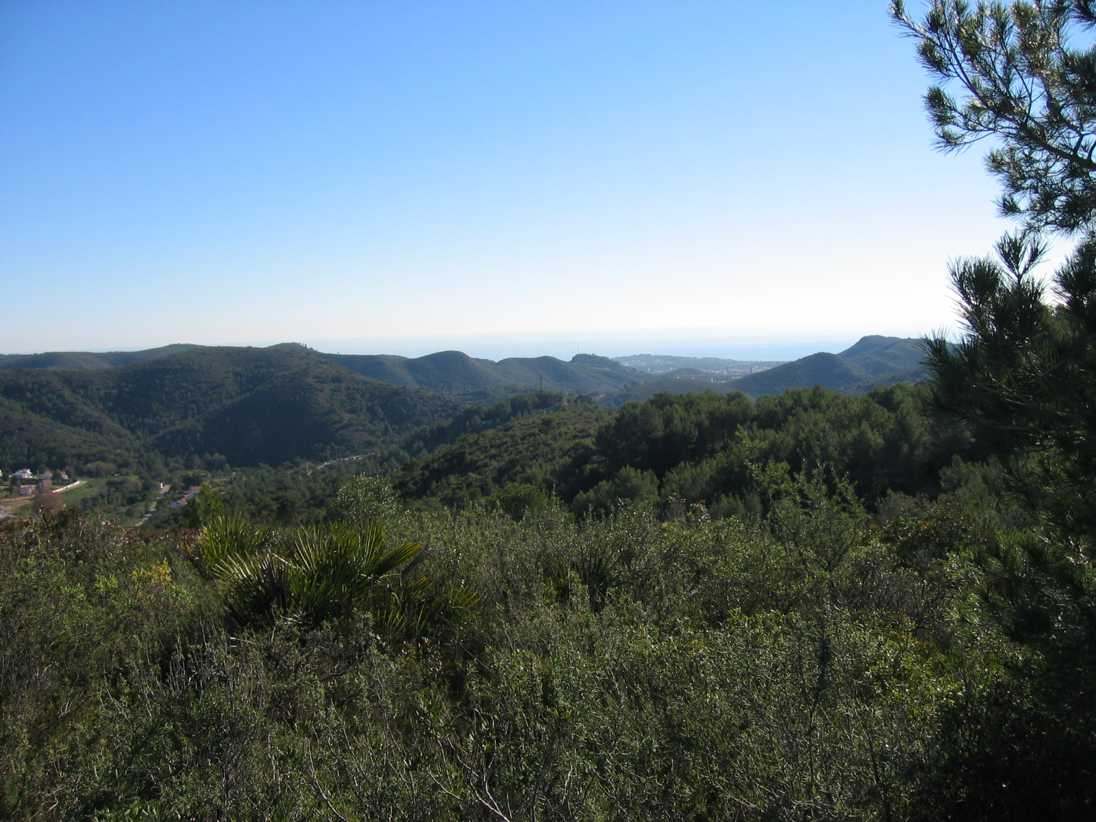 Vista cap al mar mediterrani des del Puig-roig (Bonastre)